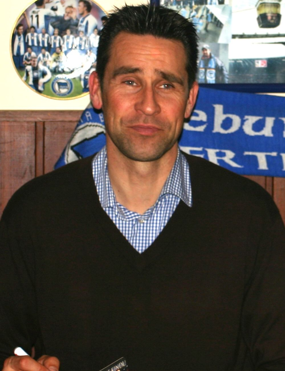 Michael Preetz beim Fantreff in der Zwitscher Klause